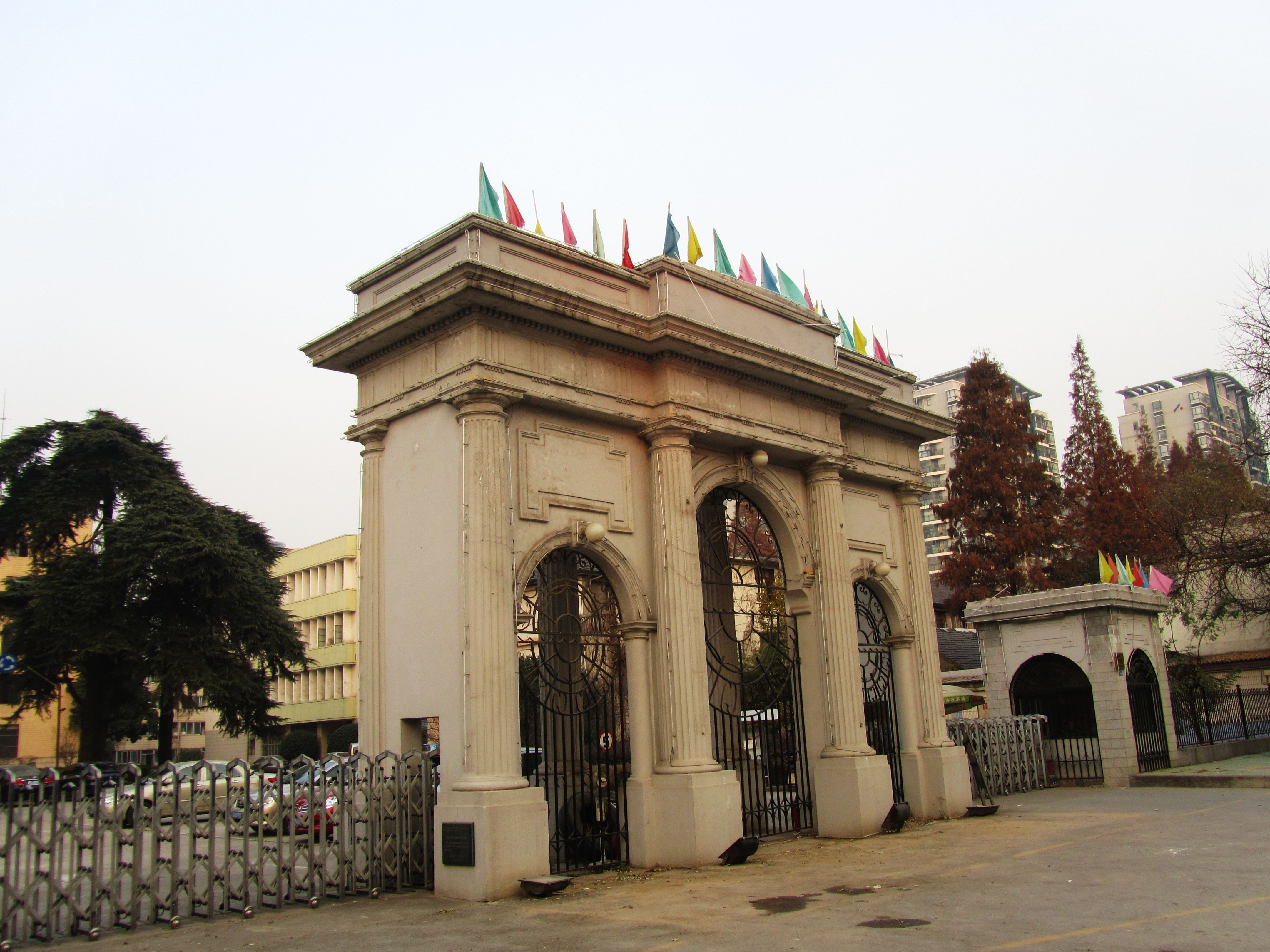 南京原国立中央政治大学门楼。